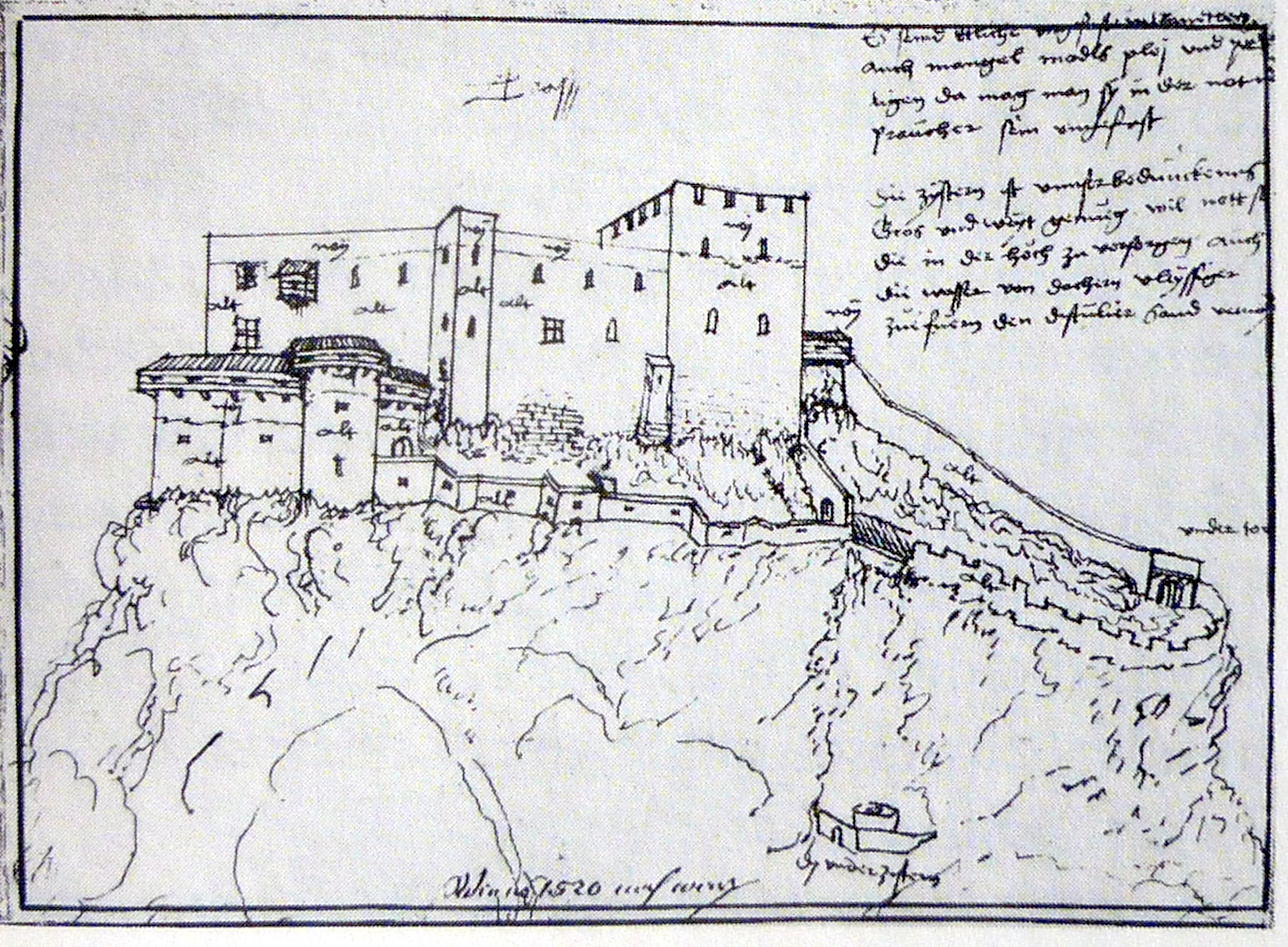 Schloss Tarasp: um 1520 mit geplanten Neubauten